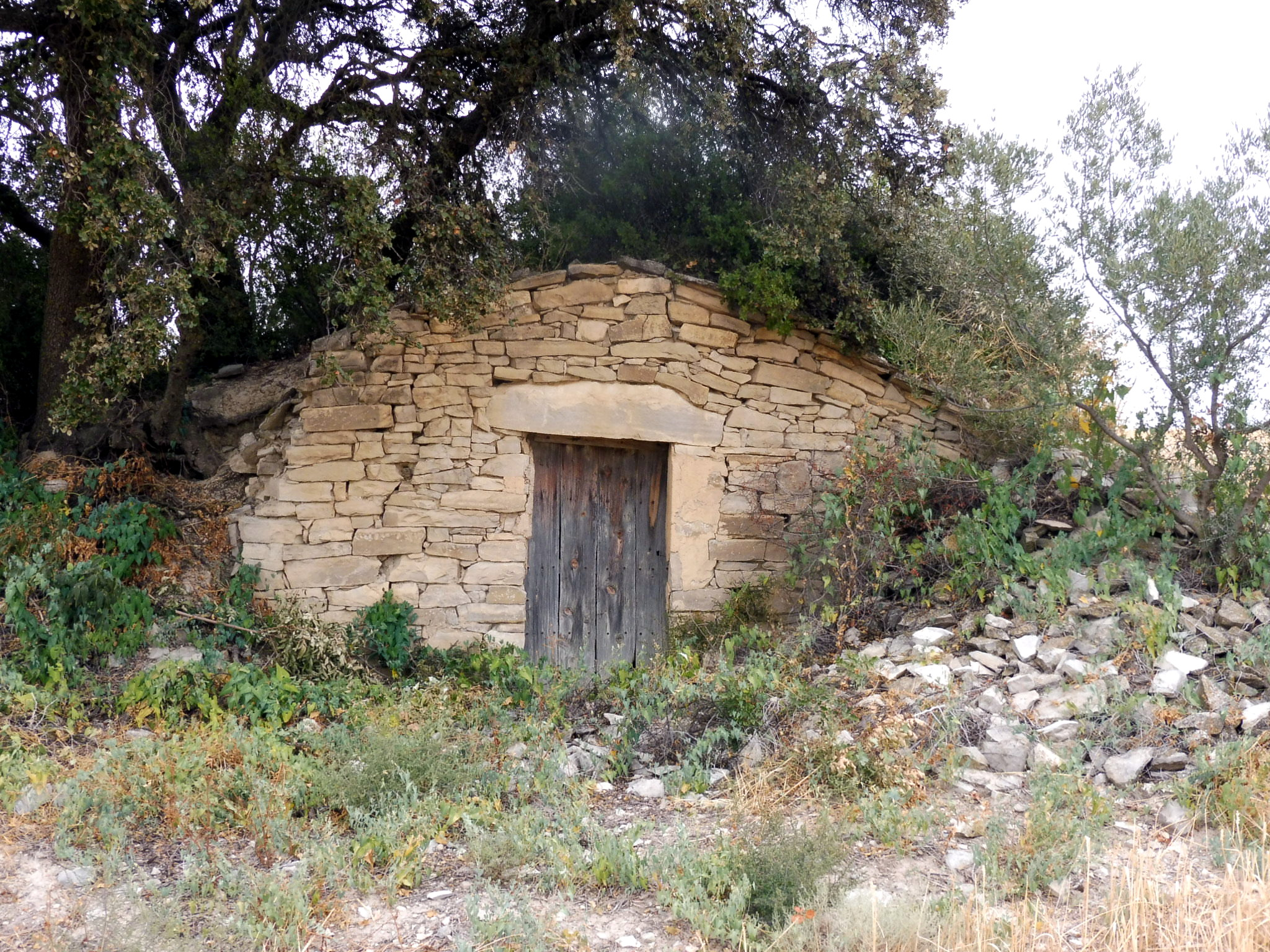 Cabana de volta de la Pleta de la Torre (Granyena de Segarra) This is a a photo of a natural area in Catalonia, Spain, with id: ES510254